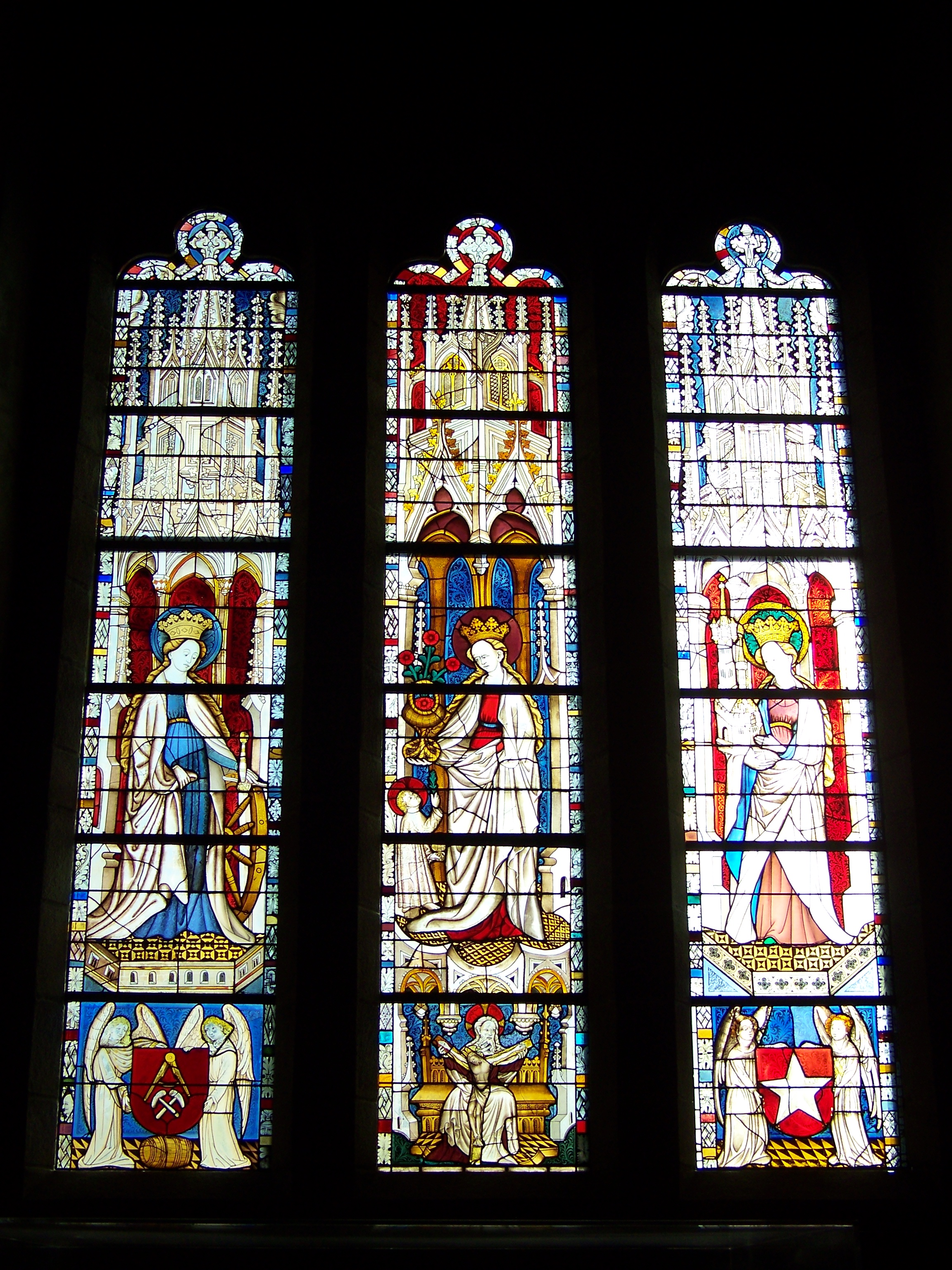 Beschreibung auf Flickr: The Virgin Mary and Five Standing Saints above Predella Panels Ergänzung: Dieses Fenster befand sich ursprünglich in der Karmeliterkirche zu Boppard und wurde später verkauft. Heute befindet es sich im Musium The Cloister.